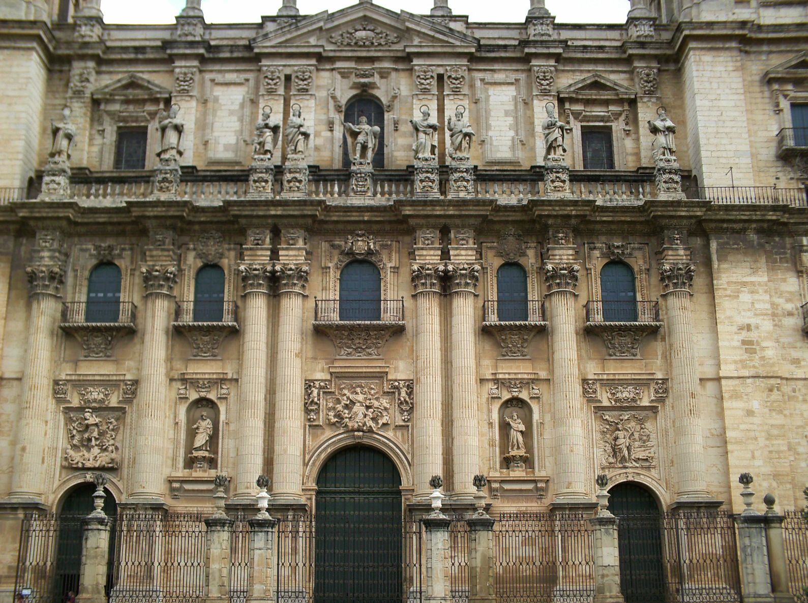 Portada de la Catedral de Jaén. Parte central.